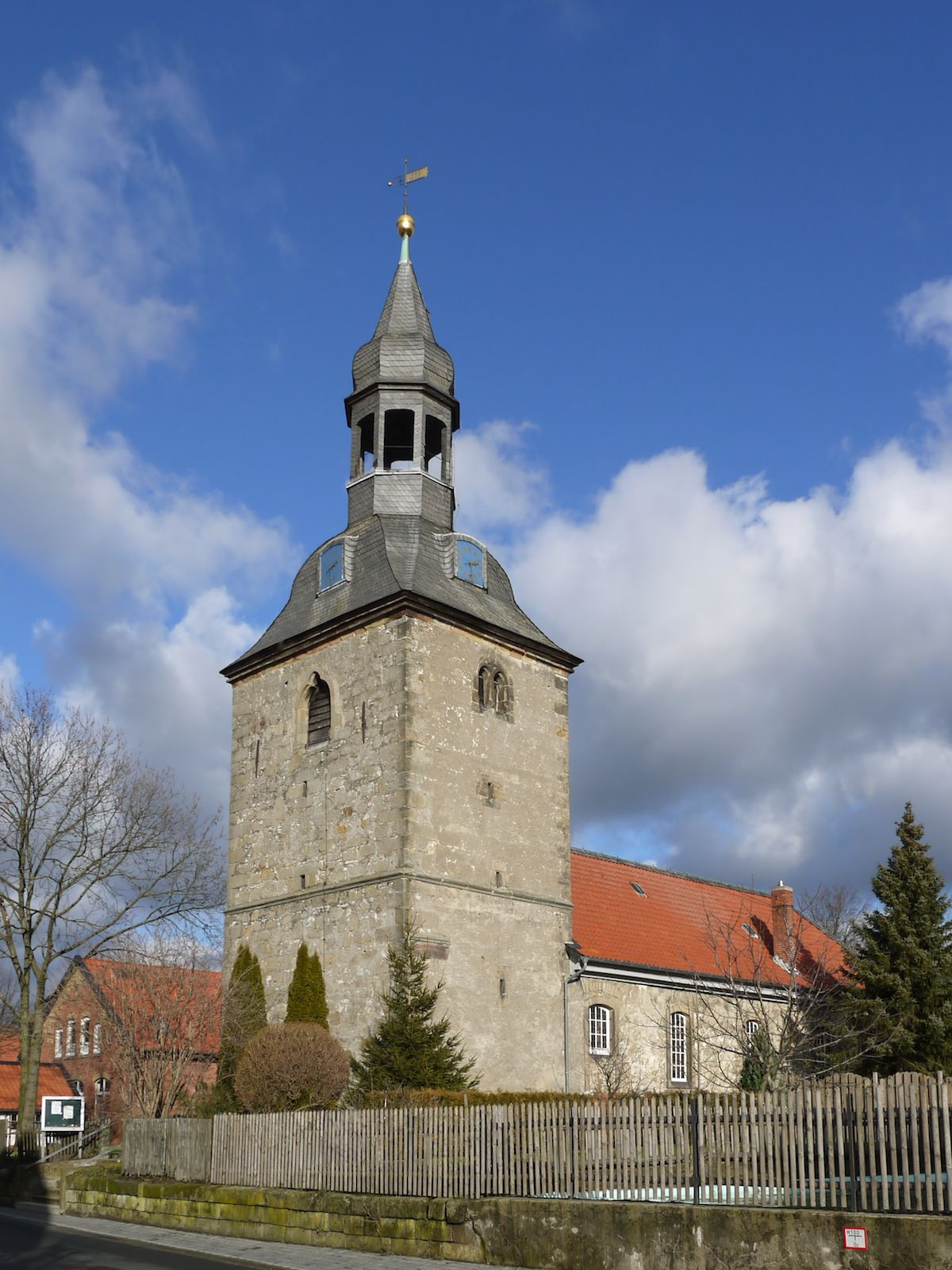 Evangelische St.-Servatius-Kirche von Haverlah